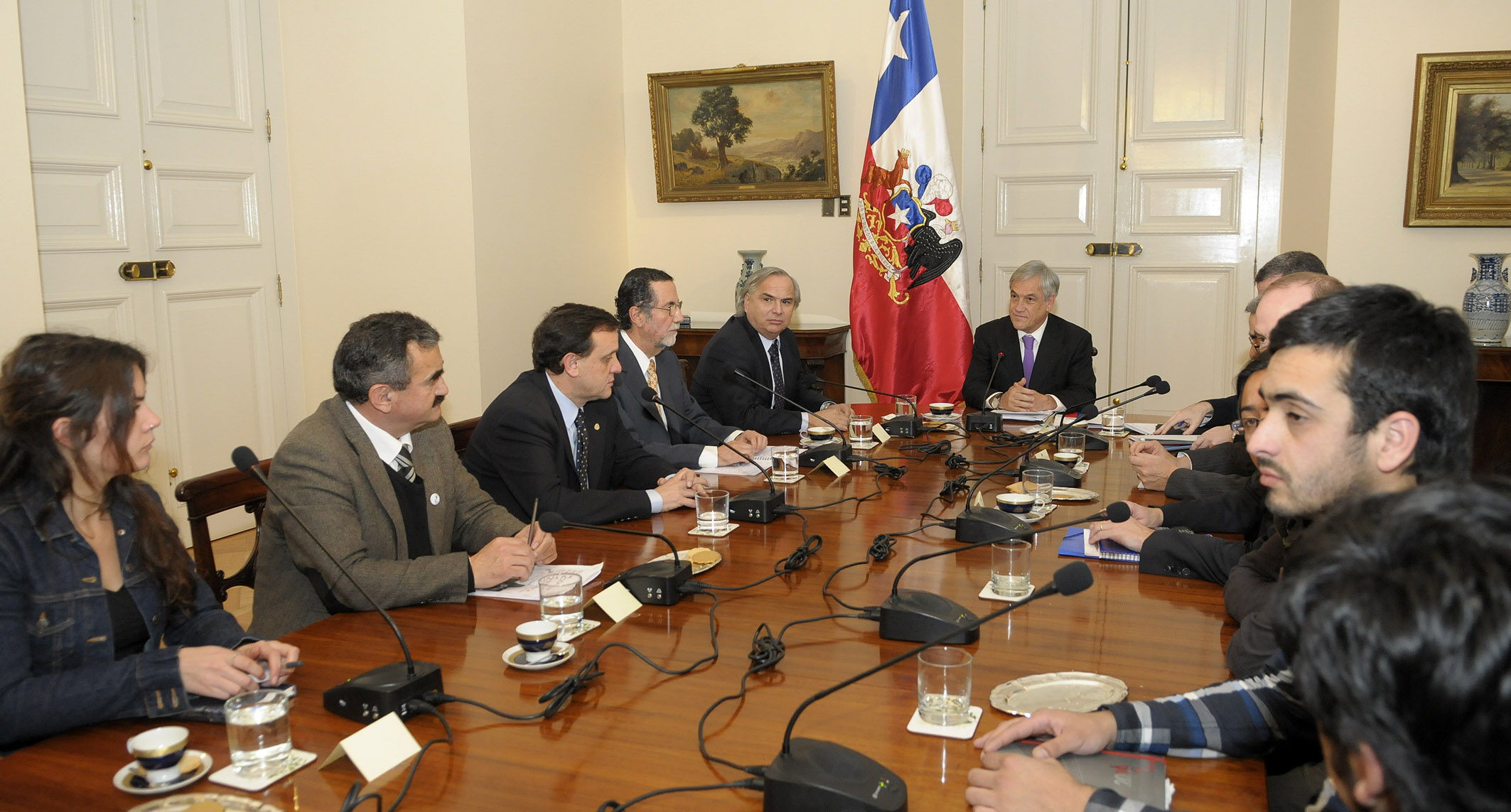 Reunión de Sebastián Piñera estudiantes universitarios y secundarios, rectores CRUCH y profesores.